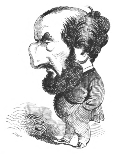 Portrait satirique de Émile Augier.